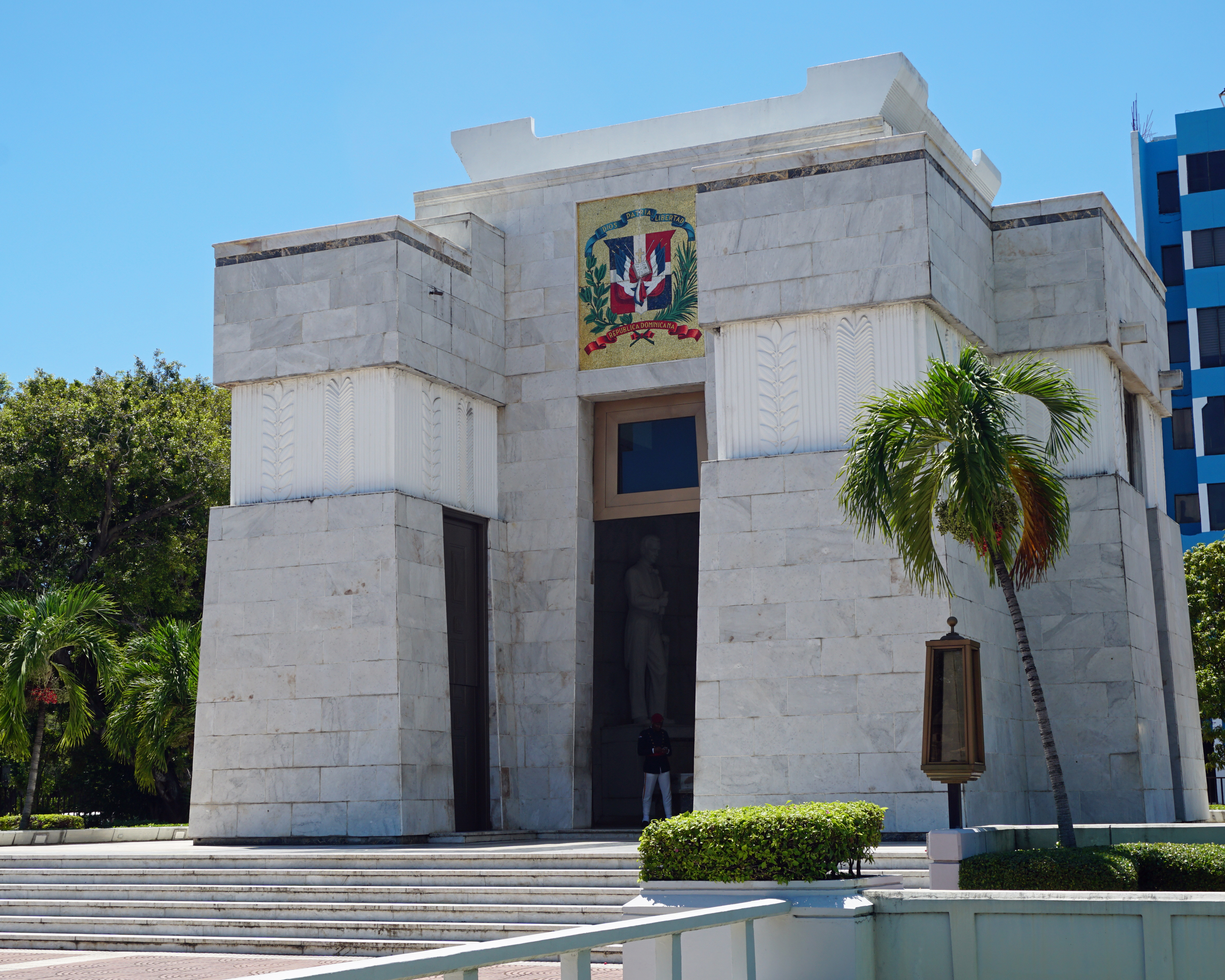 Mausoleo Altar de la Patria, Parque Independencia, Ciudad Colonial Santo Domingo, República Dominicana.